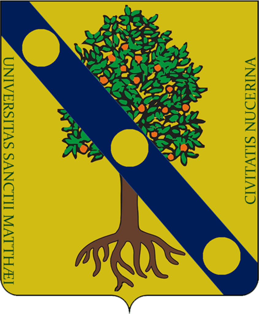 Riadattazione dello stemma dell'antica università di Nocera San Matteo, realizzato seguendo le ricerche storiche usate anche dalle associazioni rievocative del territorio. La riproduzione è approssimata ed ha un puro fine informativo e didattico.